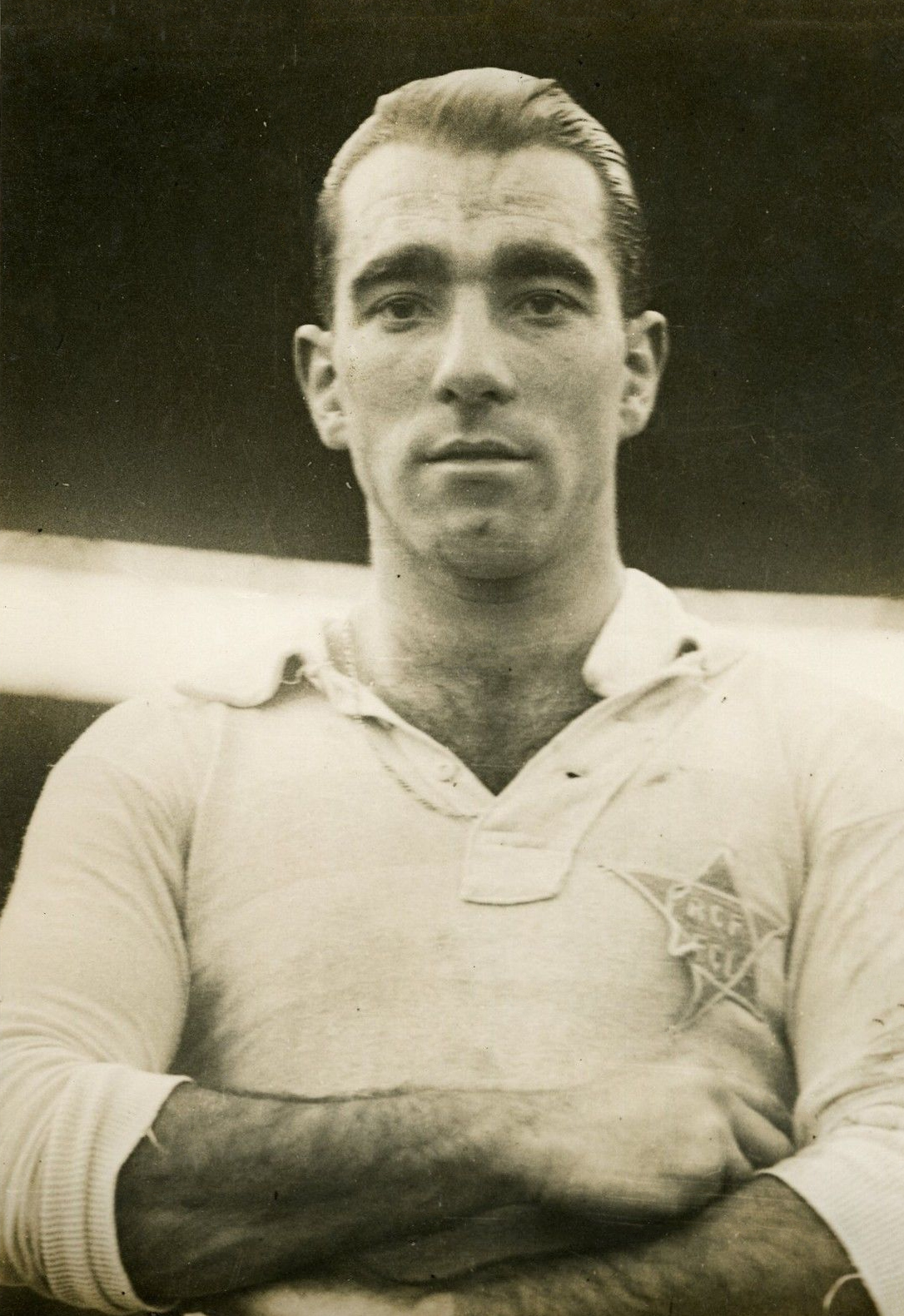 "ANATOL Capitaine Equipe de France 1932" Photo originale G. DEVRED / Agce ROL